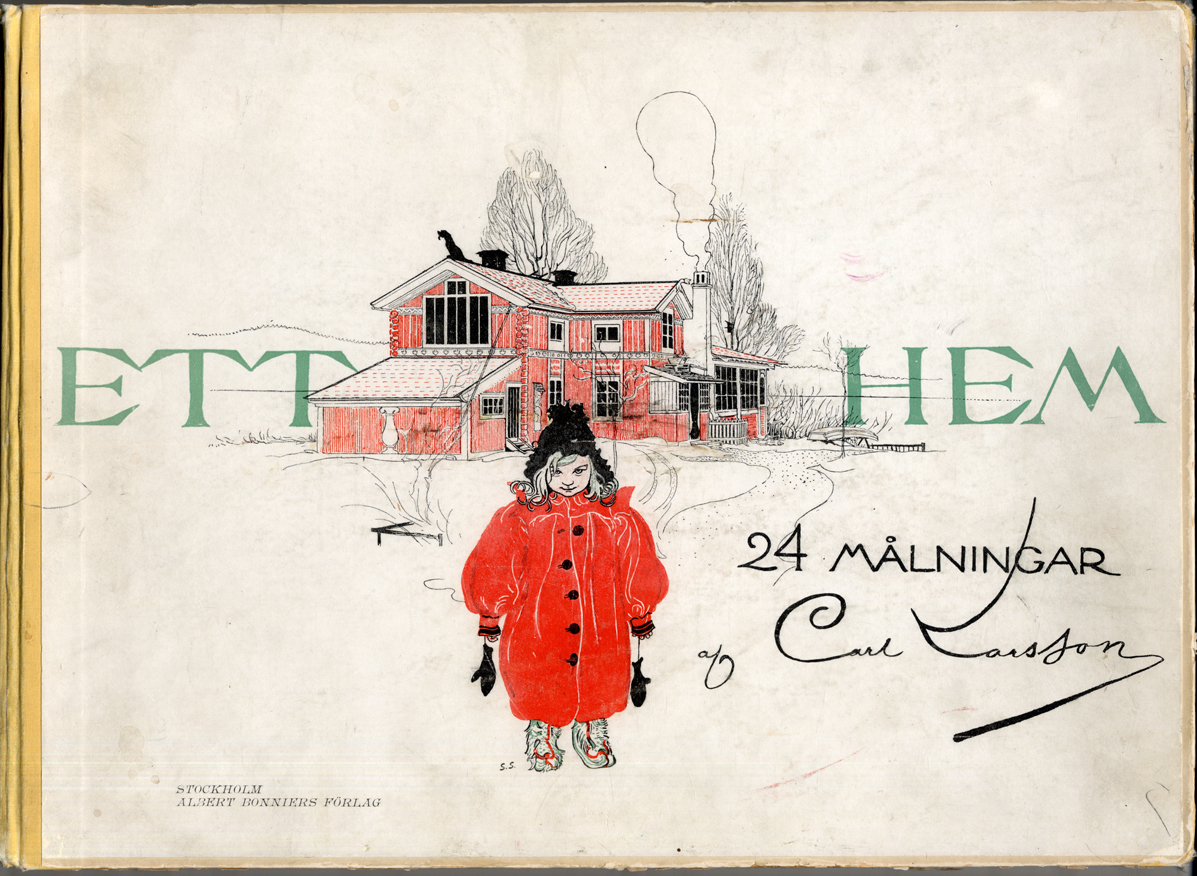 Title - Ett hem